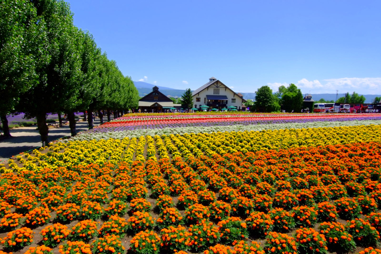 ファーム富田（Farm Tomita）